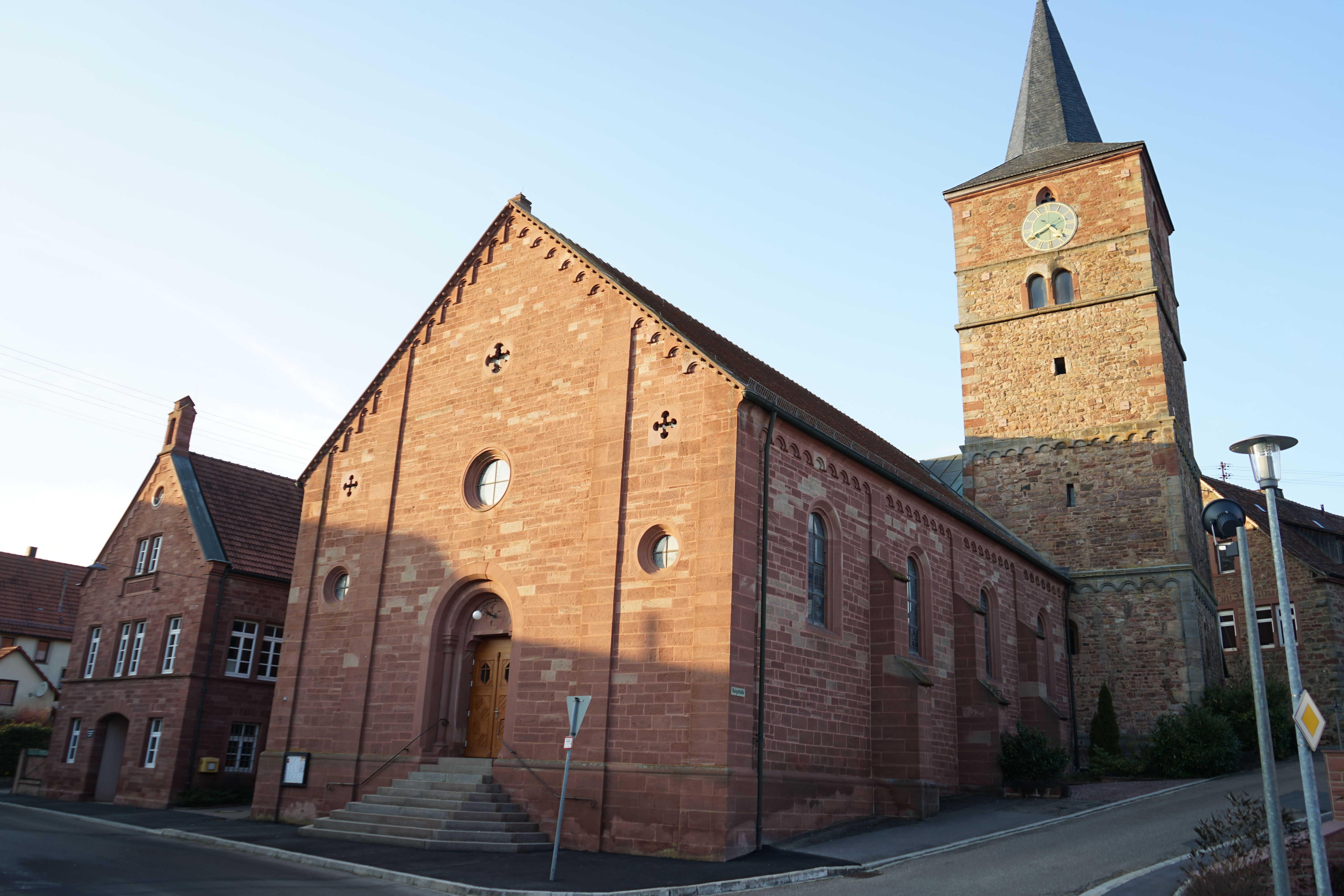 Kirche Uissigheim